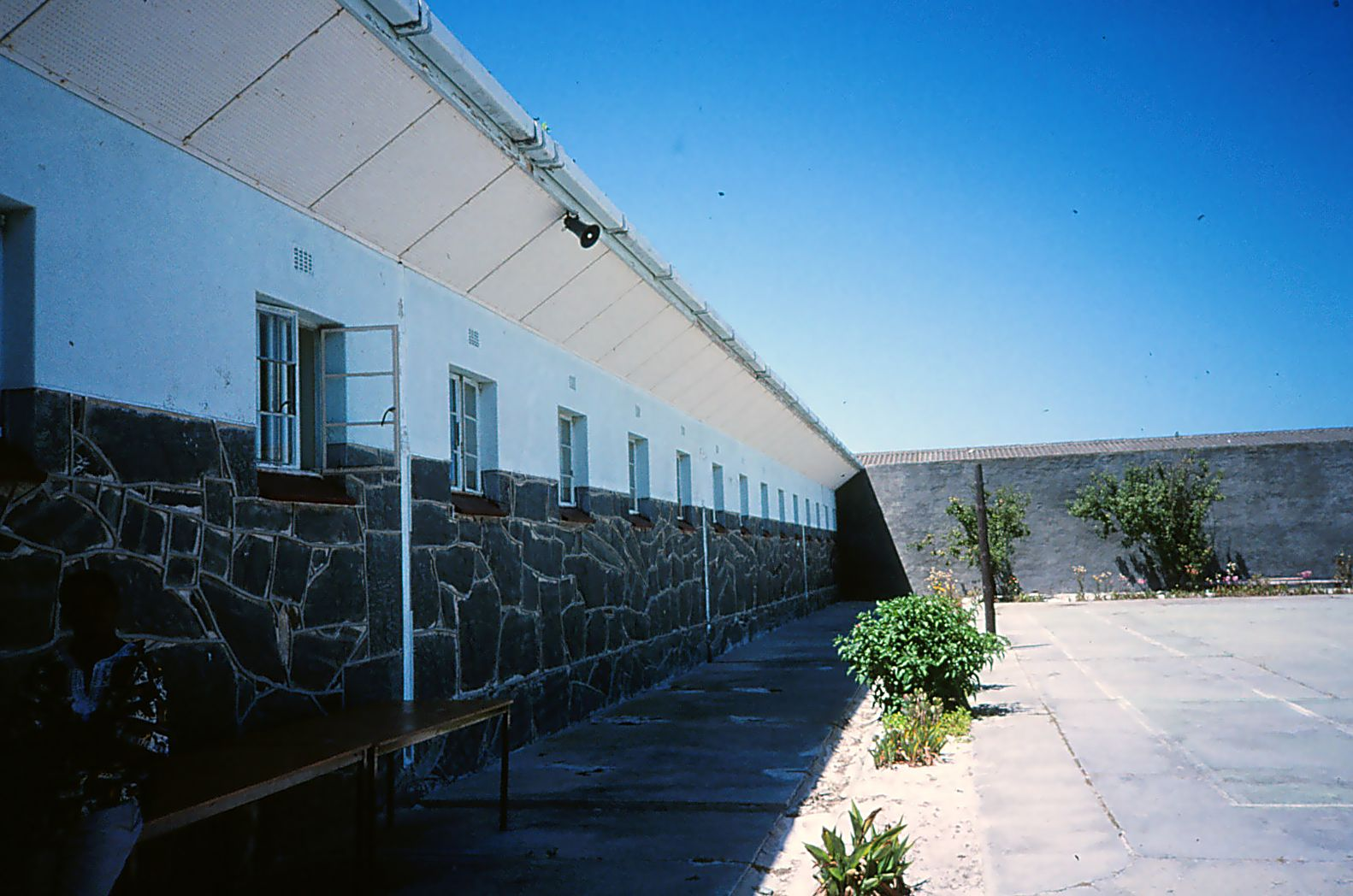 Fængselsgården ved sektion B, hvor Nelson Mandela var fængslet på Robben Island. Det åbne vindue er ind til Mandelas celle. Februar 1997.